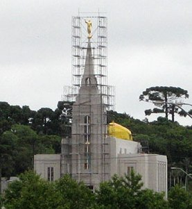 Curitiba Brazil Temple under construction